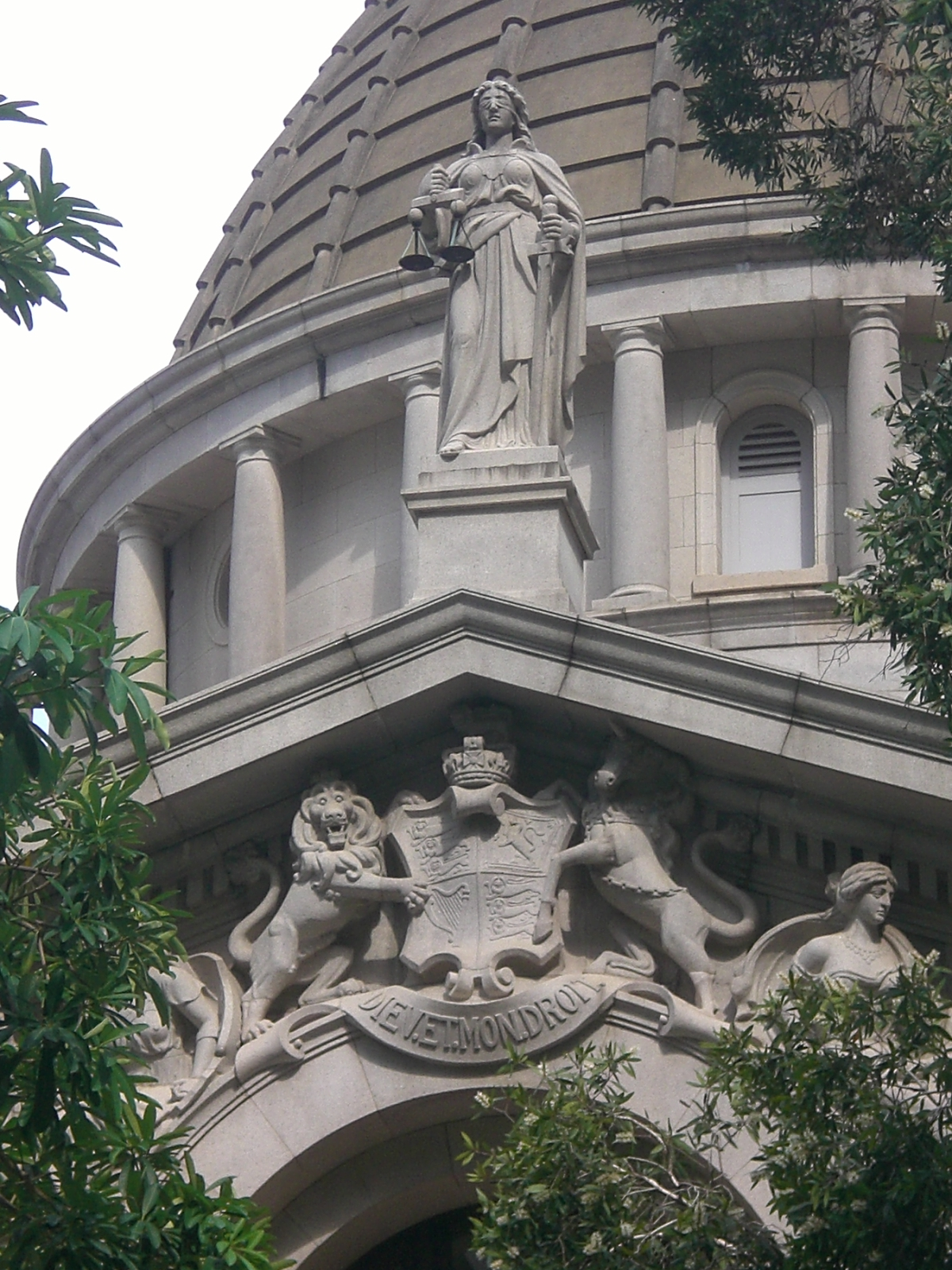 中環香港立法會大樓外觀zh:塑像